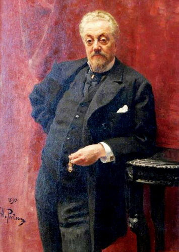 Ritratto dell'avvocato Vladimir Gerard (1839-1903)